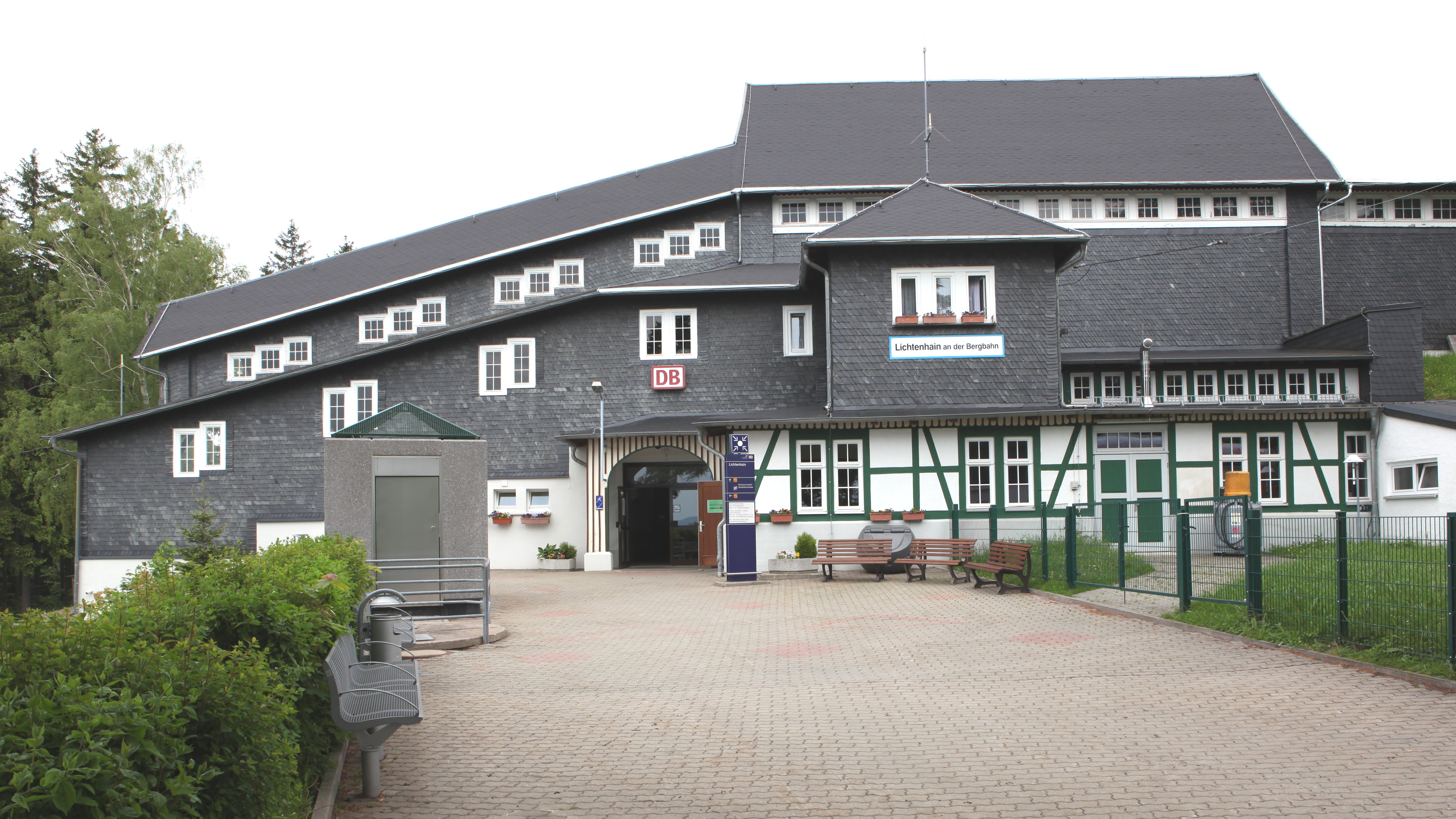 Bahnhof der Bergbahn in Lichtenhain, Ortsteil der Stadt Oberweißbach/Thüringer Wald im Landkreis Saalfeld-Rudolstadt